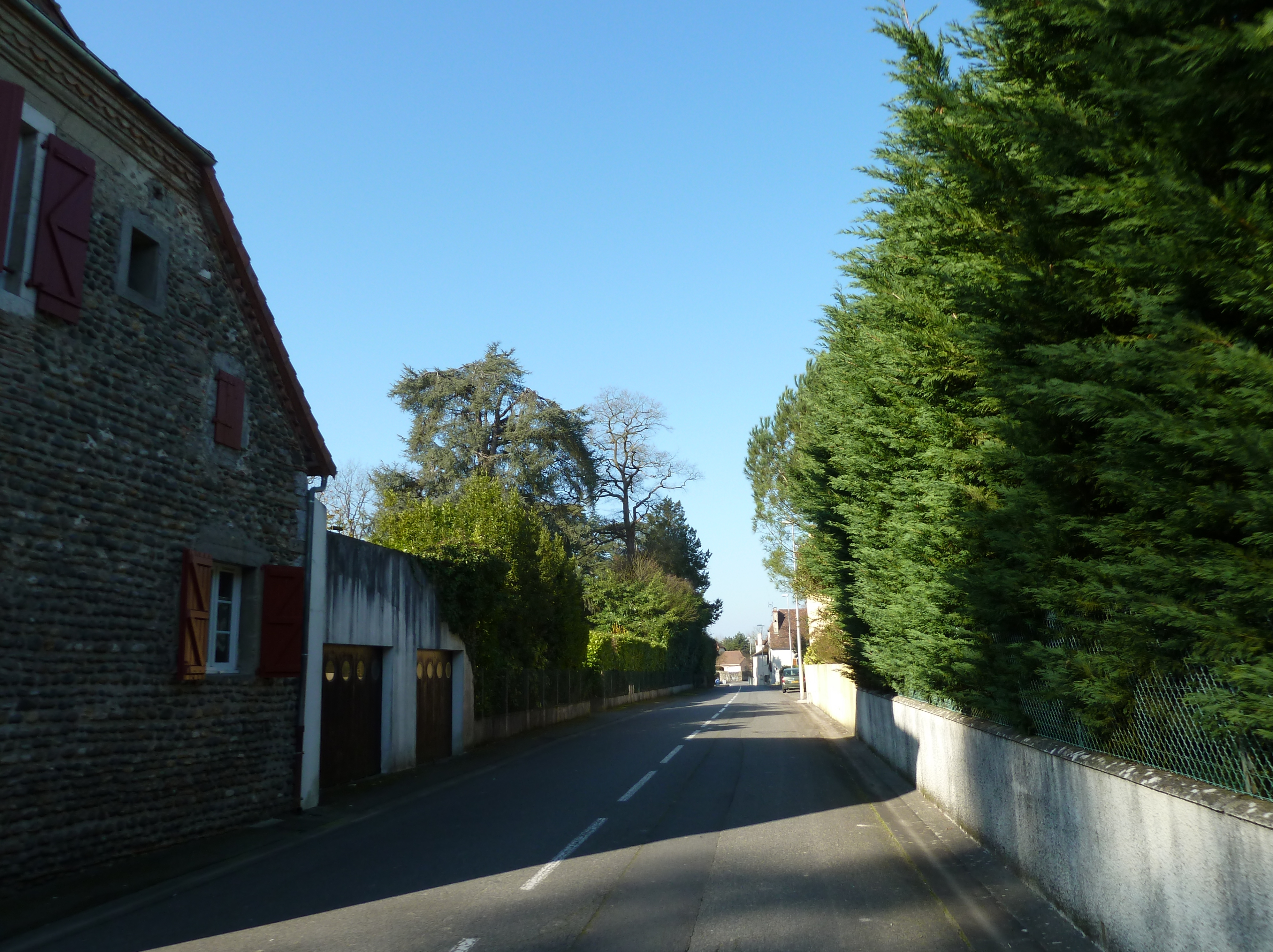 Mont (Pyrénées-Atlantiques)